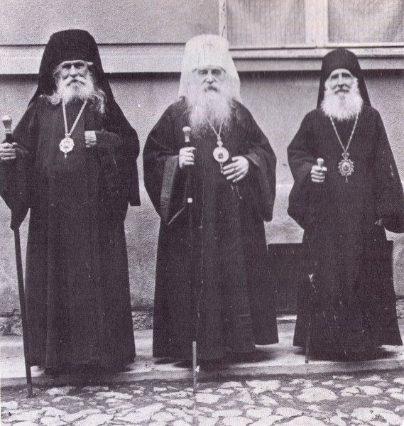 Архиепископ Гермоген, Блаженнейший митрополит Антоний и епископ Иоанн в день епископской хиротонии последнего. Белград.